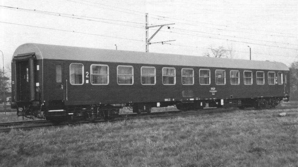 Prototypowy wagon osobowy standardu UIC-Z2 typu 127A wyprodukowany w 1980 w Fabryce Wagonów Pafawag we Wrocławiu. Prawdopodobnie fotografia fabryczna.